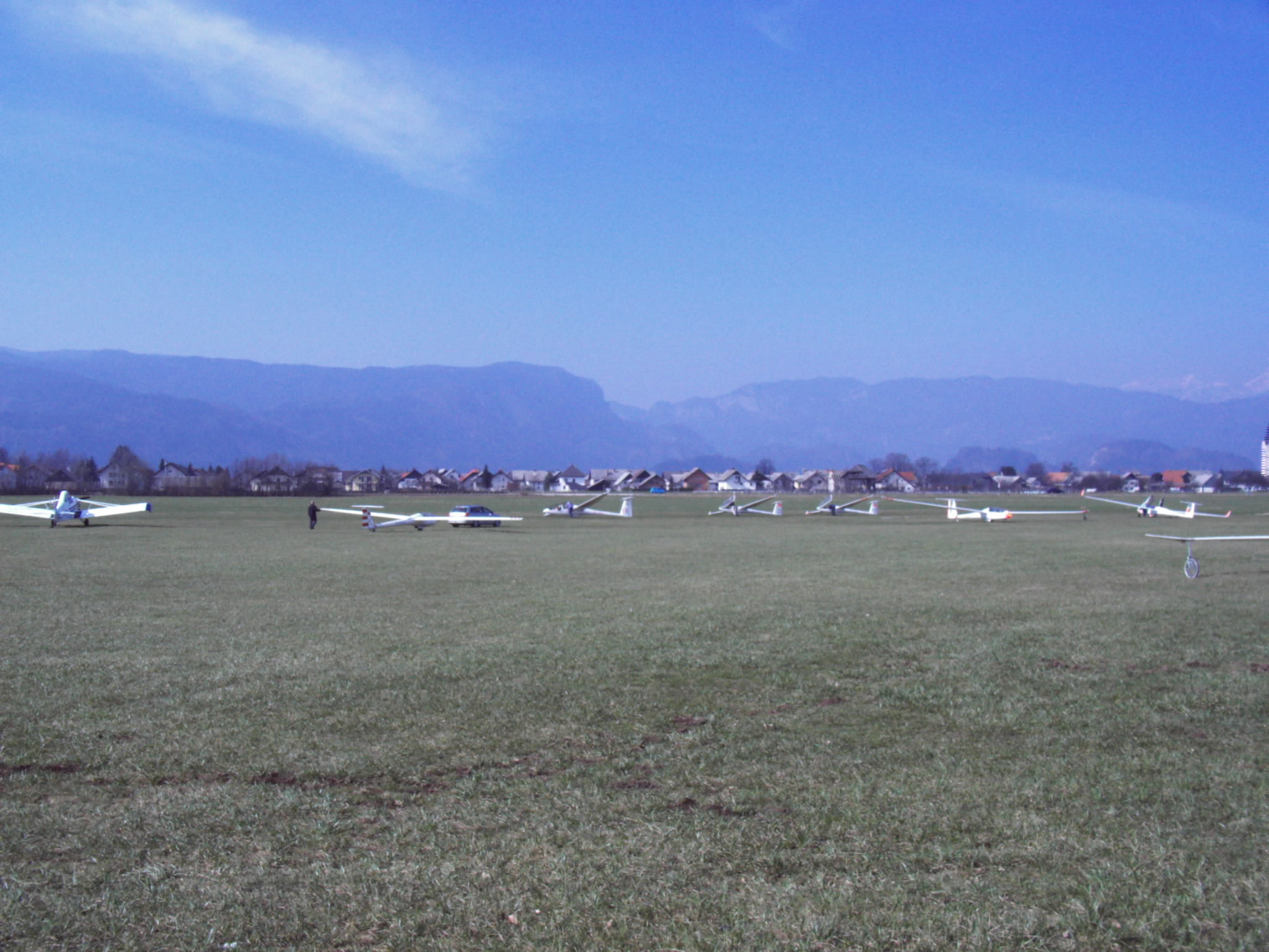 Airport Lesce / Letališče Lesce